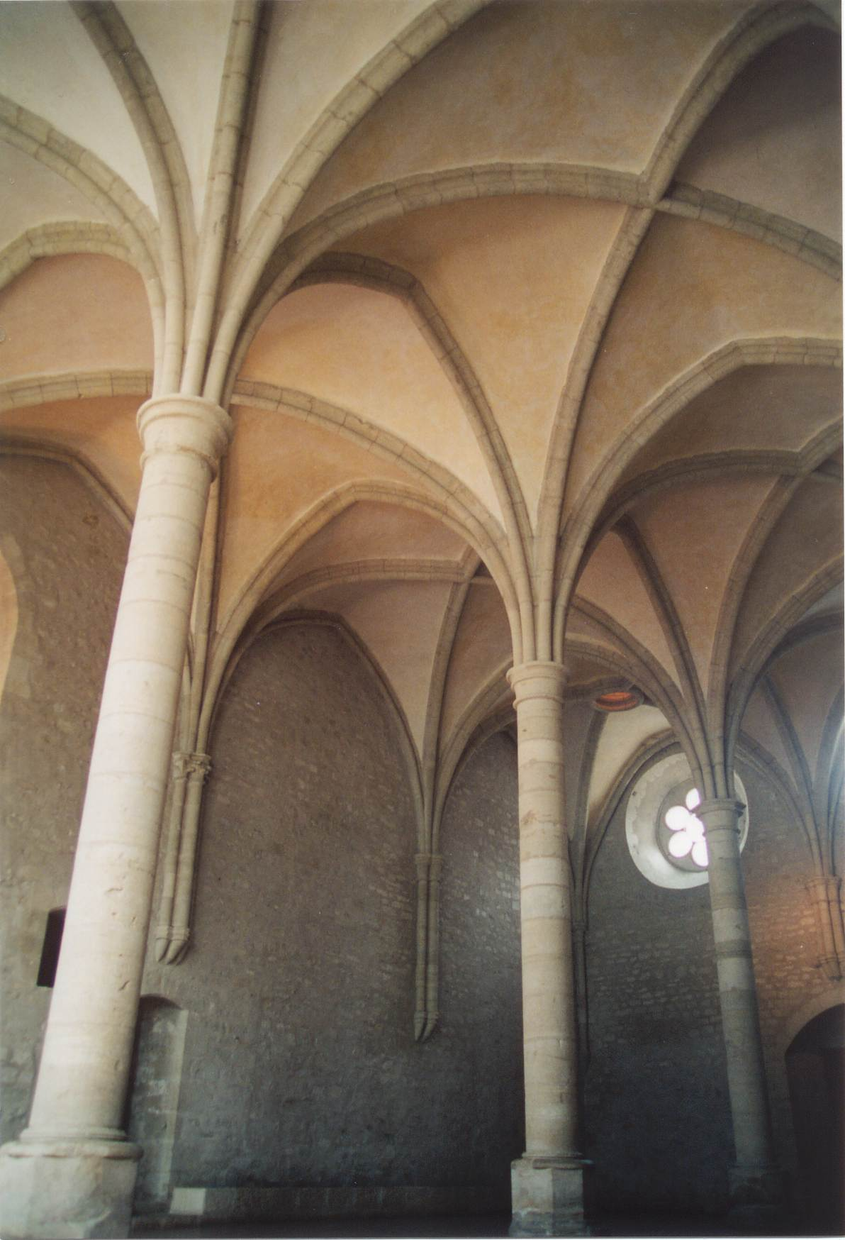 Abbaye de Noirlac, département du Cher, france. Réfectoire